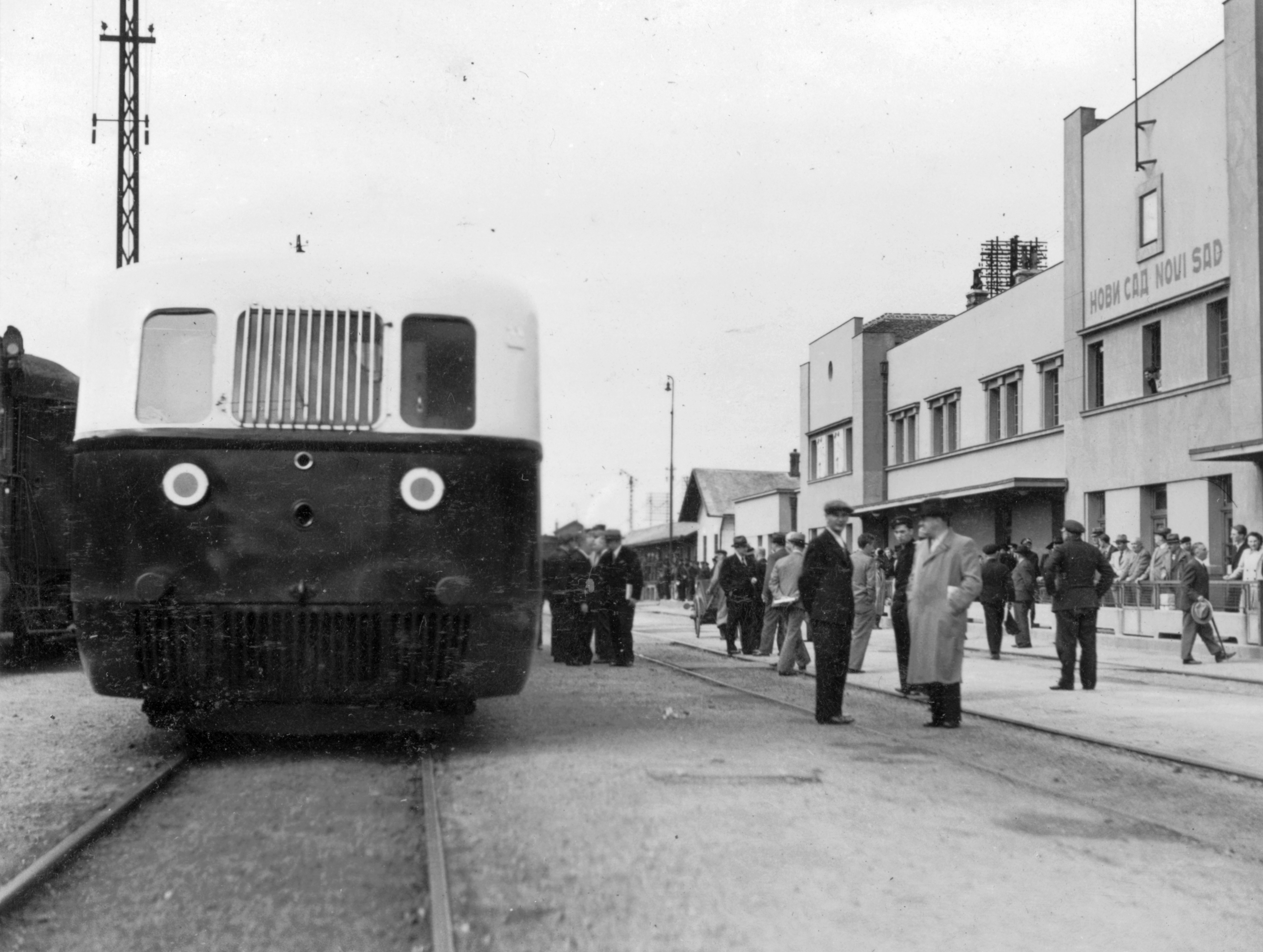 Ganz gyártmányú Árpád sorozatú (TAS) sínautóbusz. Location: Serbia, Novi Sad Tags: rail, railway, Hungarian brand, Ganz-brand Title: Ganz gyártmányú Árpád sorozatú (TAS) sínautóbusz.